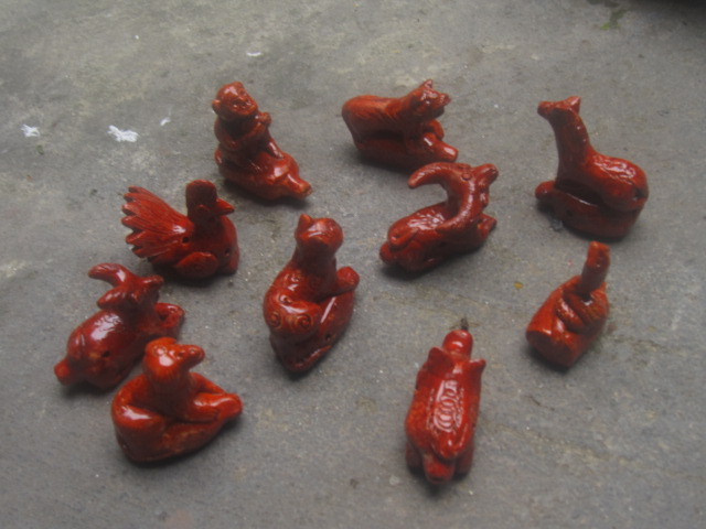 Con thổi bằng đất nung hình các con giáp - Làng gốm Thanh Hà, Hội An, Việt Nam